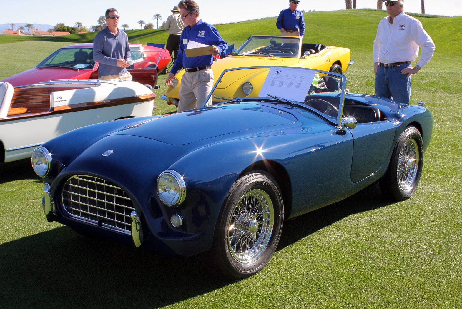 2011 Desert Classic, La Quinta, CA